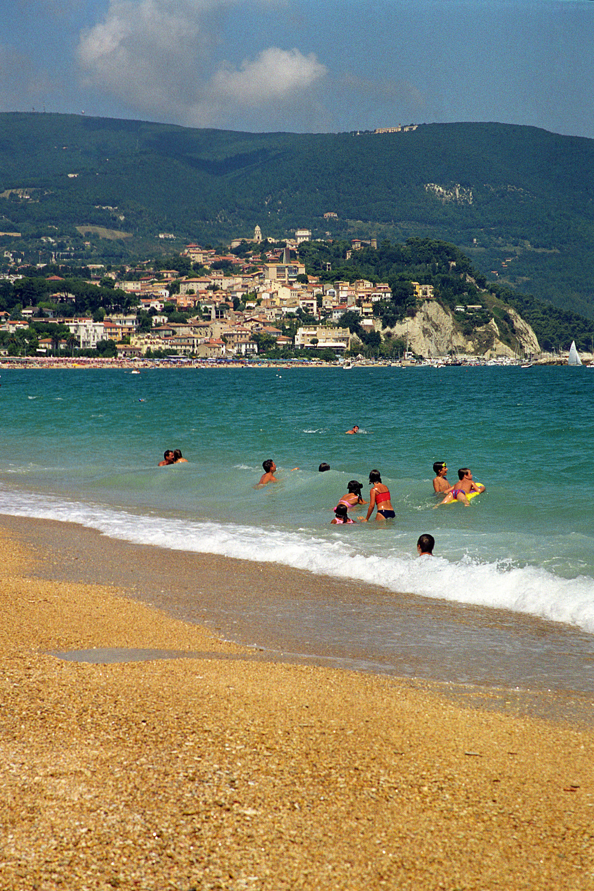 La spiaggia di Marcelli di Numana con vista verso il monte Conero.Conero